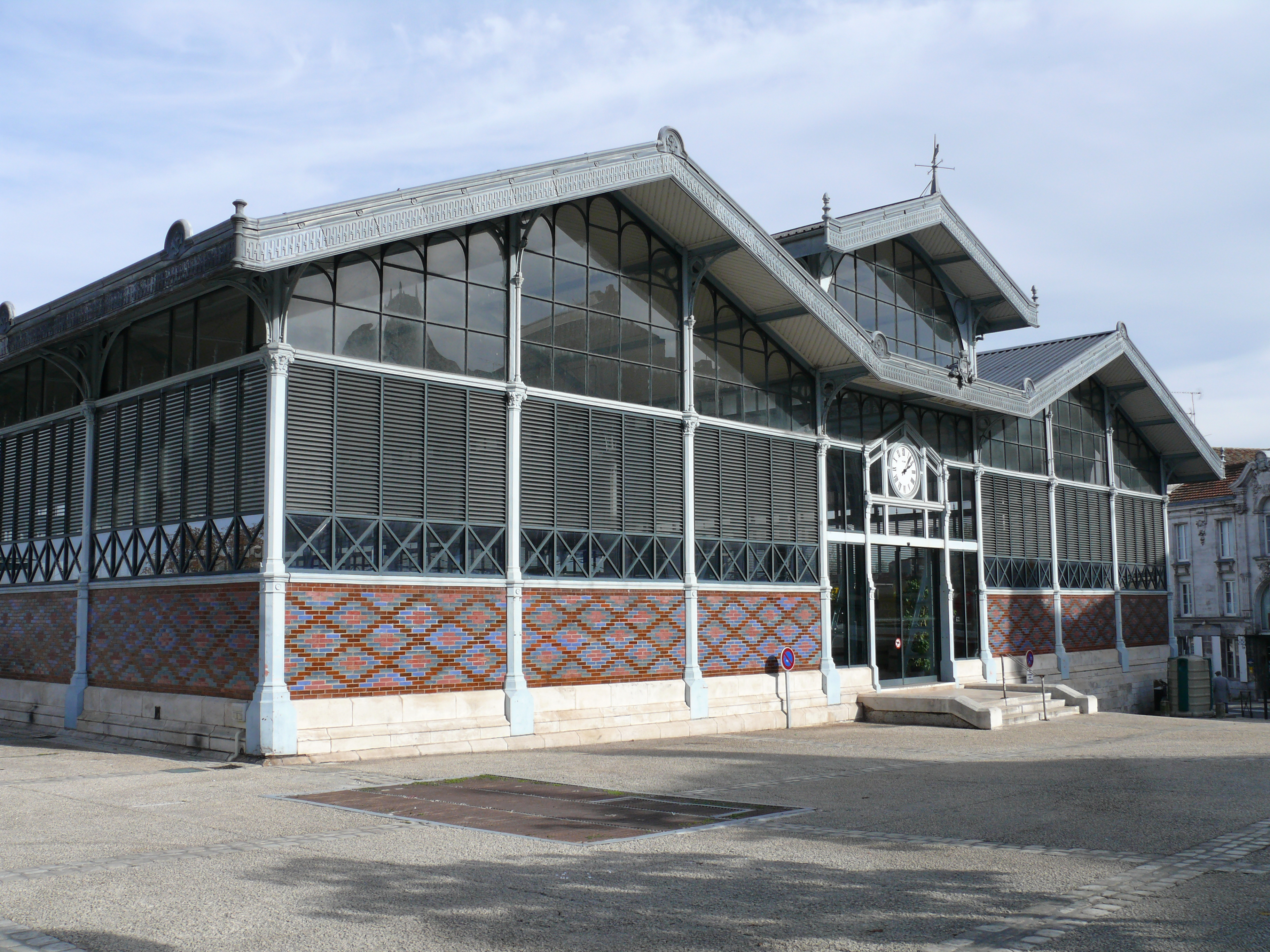 Angoulême - Halles